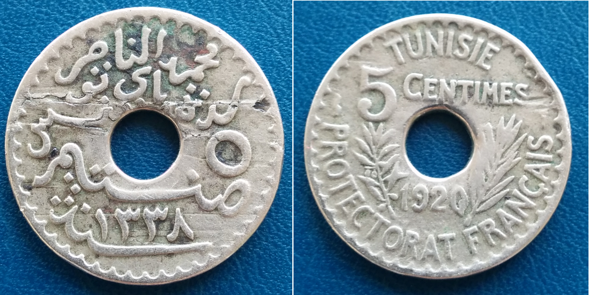 Pièce de 5 centimes - 1920